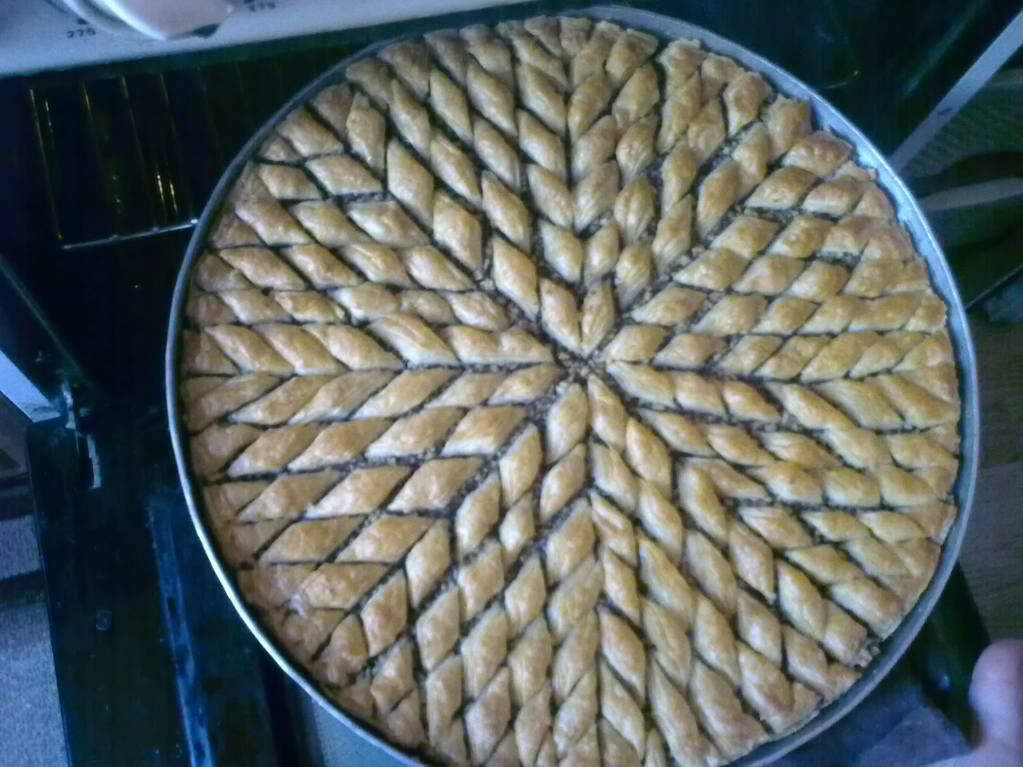 Мое производство